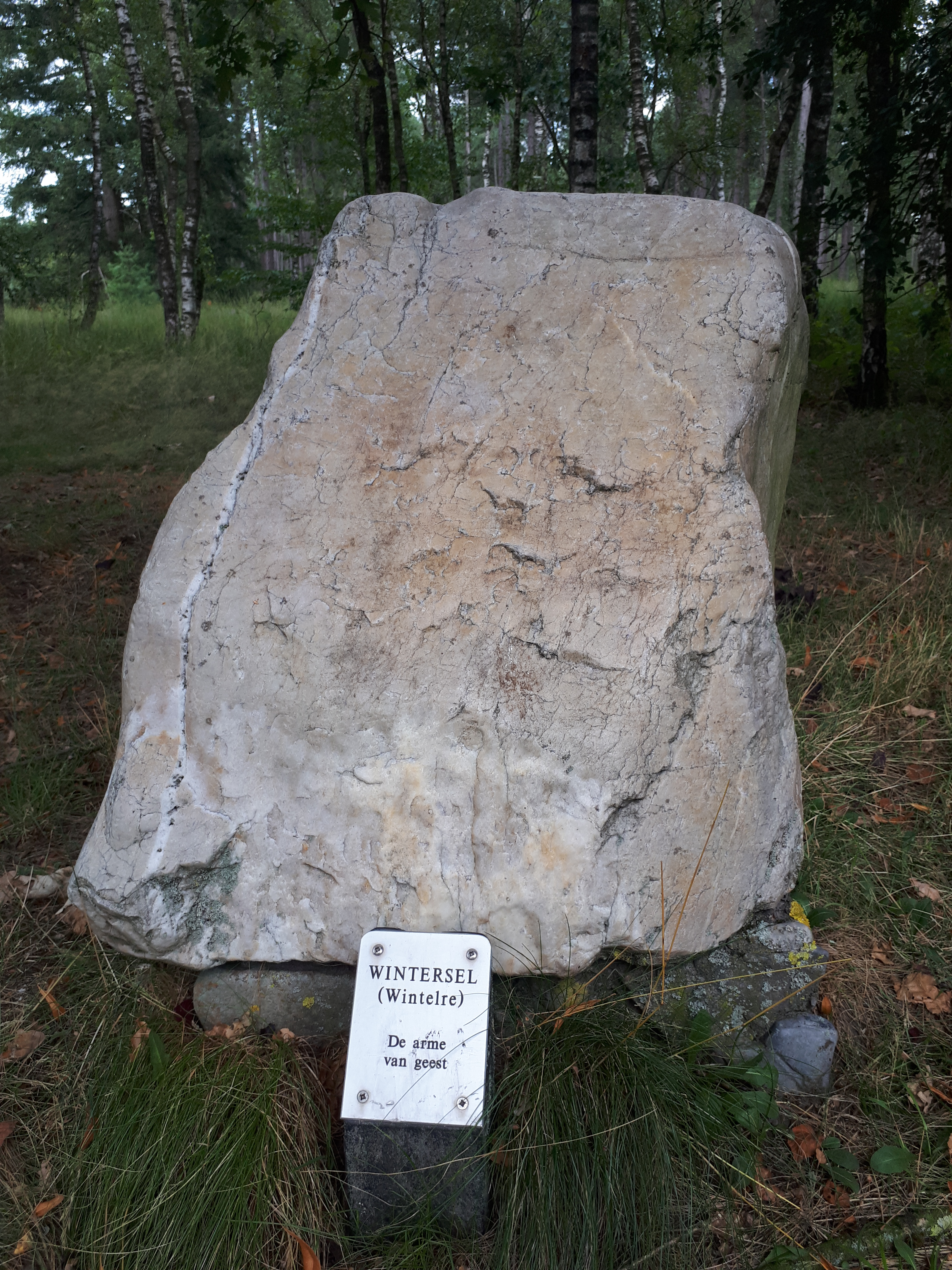 De steen bij het monument de Stenen der Zaligheden die Wintelre (Wintersel) weergeeft als de arme van geest.